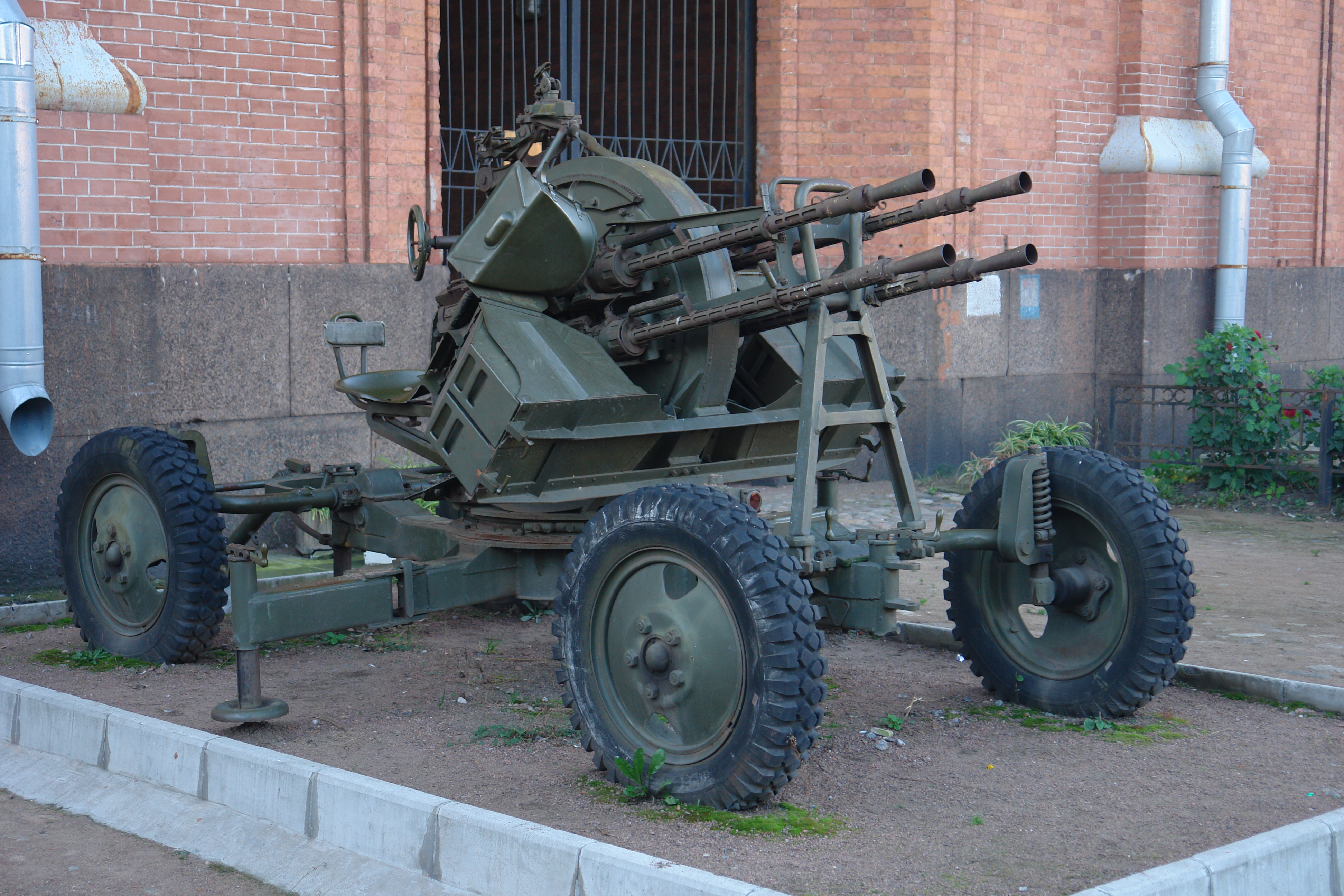 14,5-мм счетверенная зенитная пулеметная установка конструкции Лещинского ЗПУ-4. Предназначена для борьбы с самолетами на высотах до 2000 м, а также с наземными легко бронированными целями и живой силой Скорострельность - 600 выстр/мин. Масса установки - 2100 кг. Военно-исторический музей артиллерии, инженерных войск и войск связи, Санкт-Петербург. 14.5-mm quad design Leszczynski LSD-4. Designed to combat aircraft at altitudes up to 2000 m, as well as with ground armored targets easily and manpower Rate - 600 rds / min. Unit weight - 2100 kg. Military-Historical Museum of Artillery, Engineer and Signal Corps, St. Petersburg.